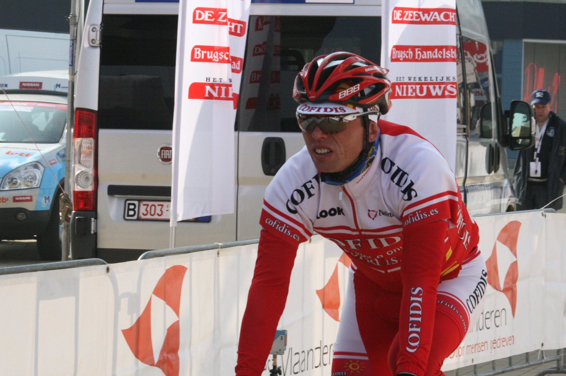 Driedaagse van West-Vlaanderen 2011, proloog in Middelkerke